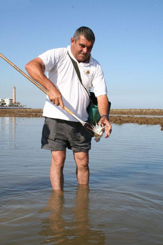 Utilización de un francajo mientras se desclava una captura (choco o sepia).